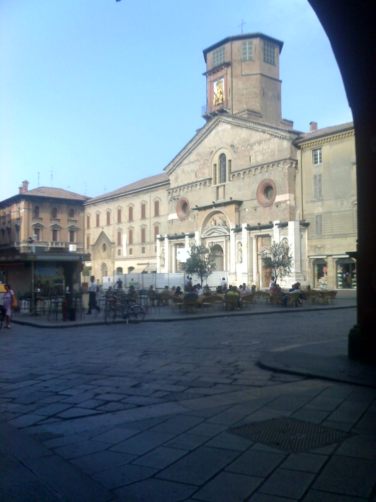 foto scattata da me col telefono di piazza del duomo di reggio emilia